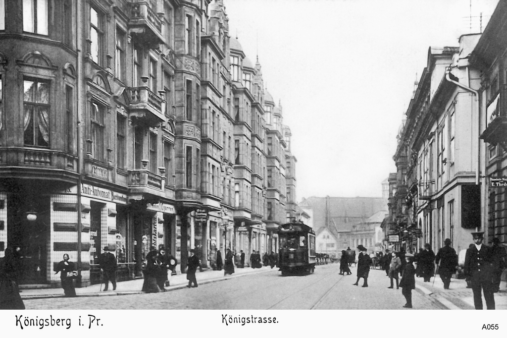 Königsberg